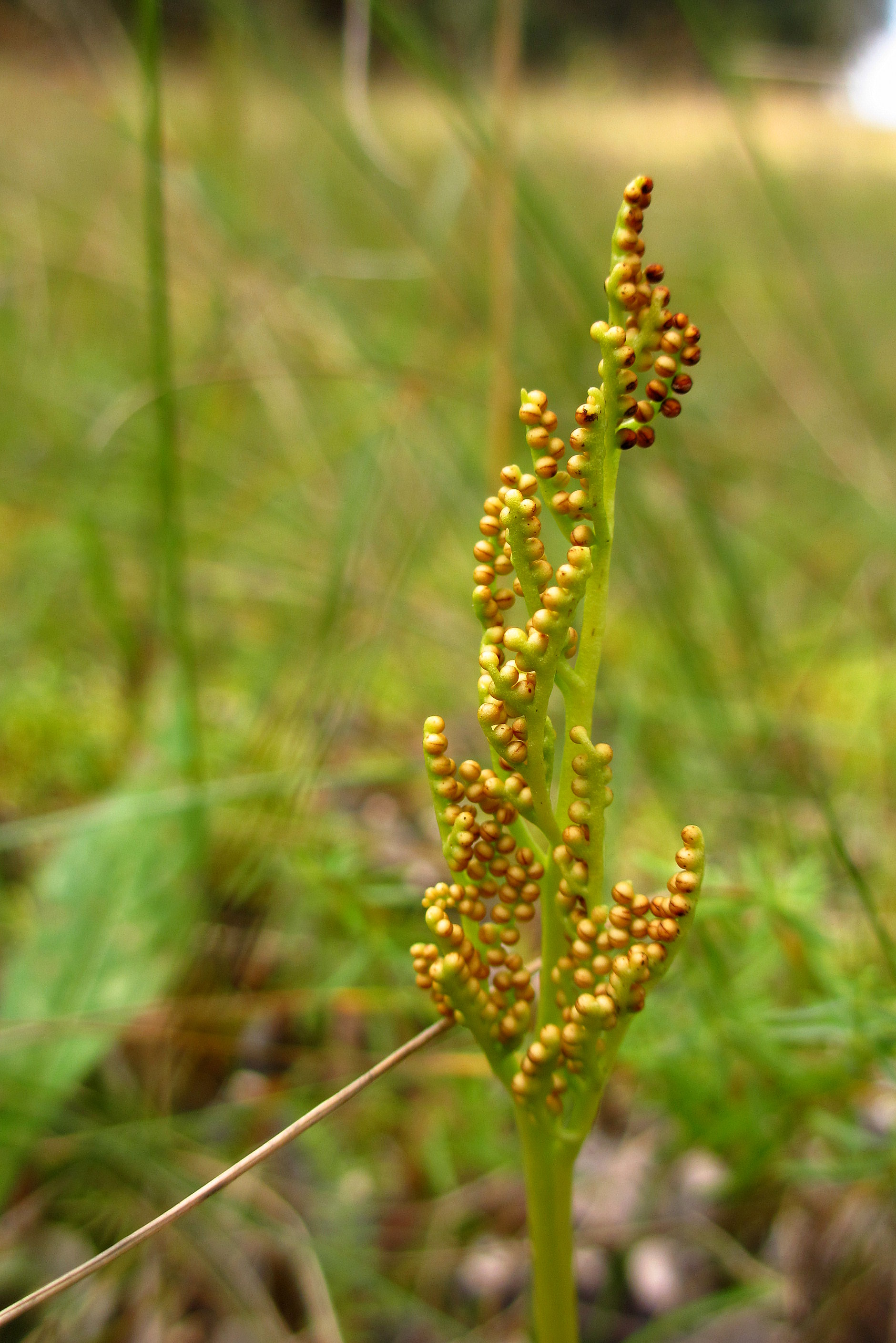 Kummeli-võtmehein Tepripalus